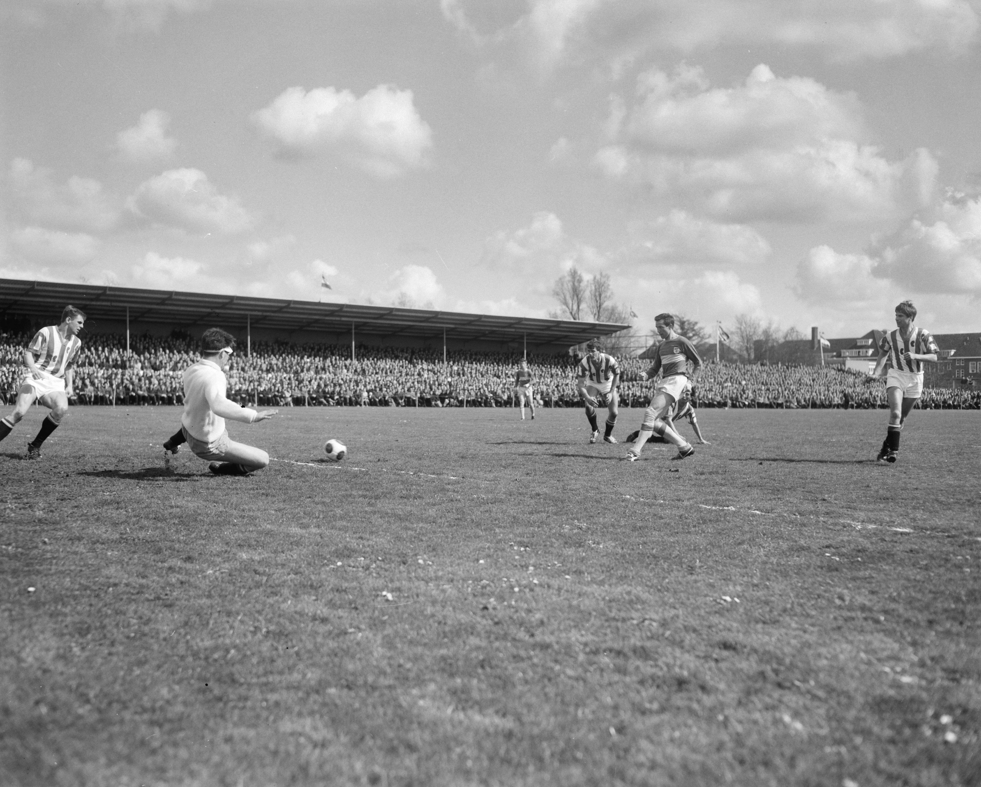 Collectie / Archief : Fotocollectie Anefo Reportage / Serie : [ onbekend ] Beschrijving : Heerenveen tegen Cambuur 0-4, spelmoment Datum : 25 april 1965 Trefwoorden : sport, voetbal Persoonsnaam : Cambuur Fotograaf : Bilsen, Joop van / Anefo Auteursrechthebbende : Nationaal Archief Materiaalsoort : Negatief (zwart/wit) Nummer archiefinventaris : bekijk toegang 2.24.01.04 Bestanddeelnummer : 917-6900